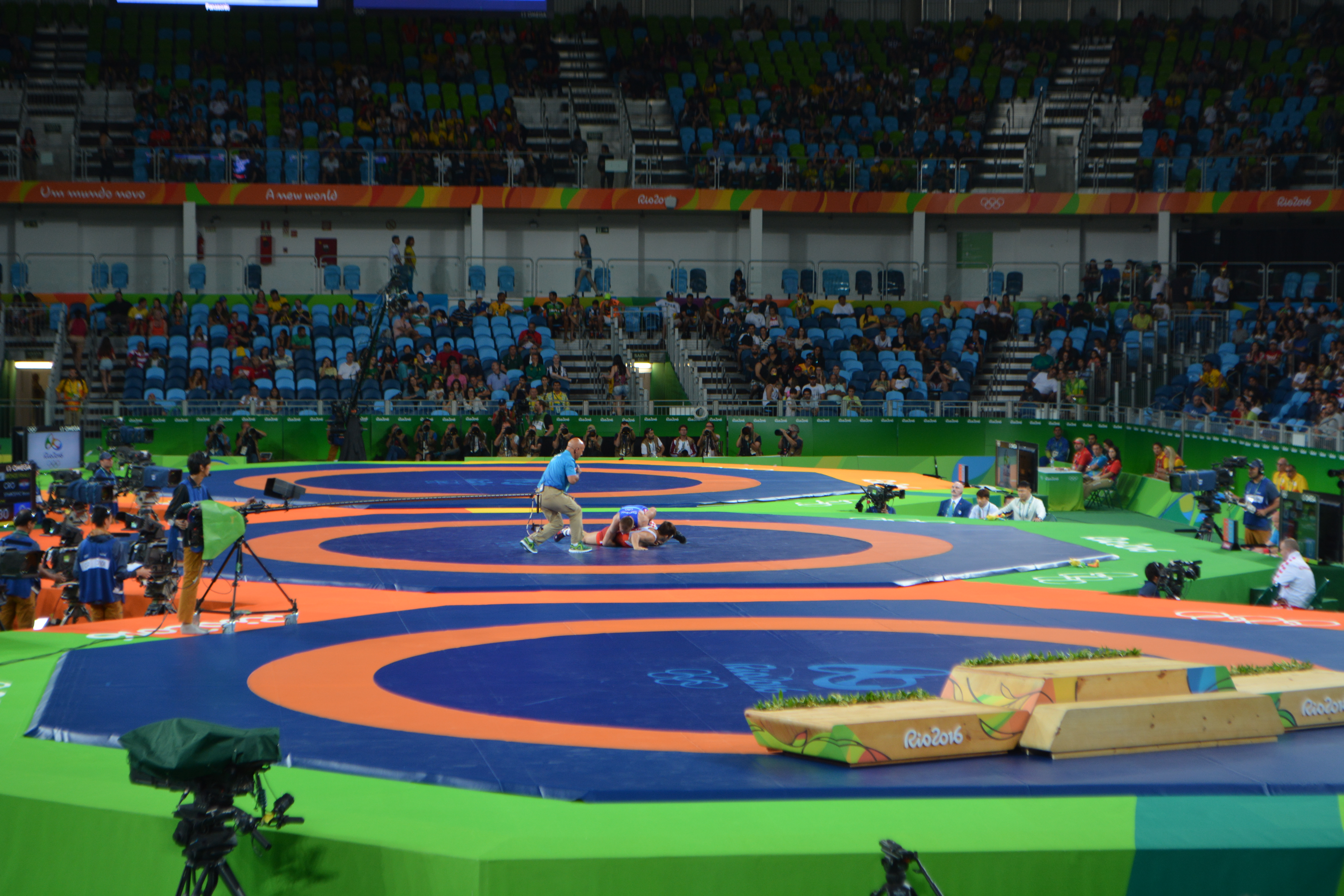 Arena Carioca 2 no Parque Olimpico do Rio de Janeiro